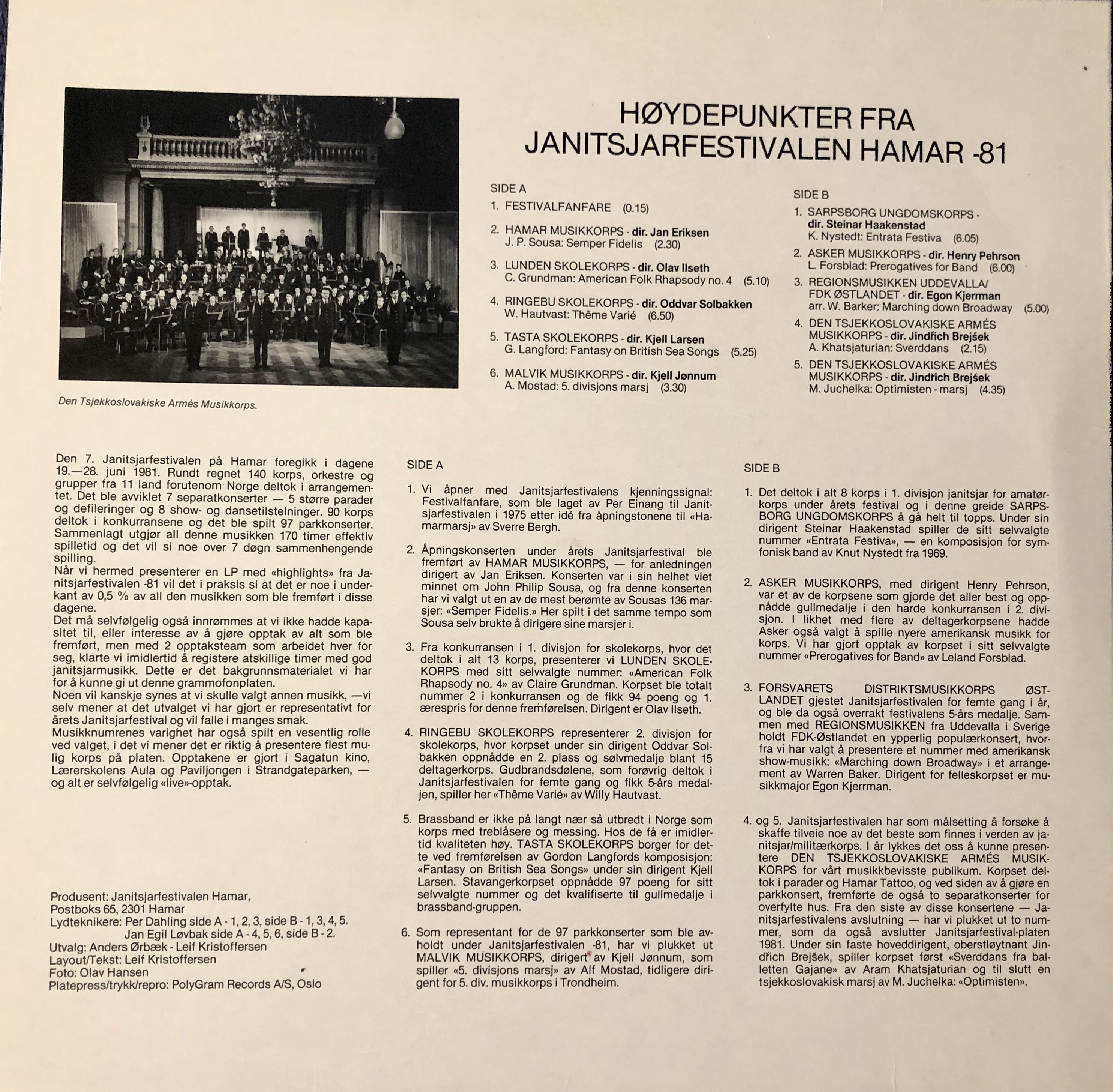 Bakside LP Hamarfestivalen 1981